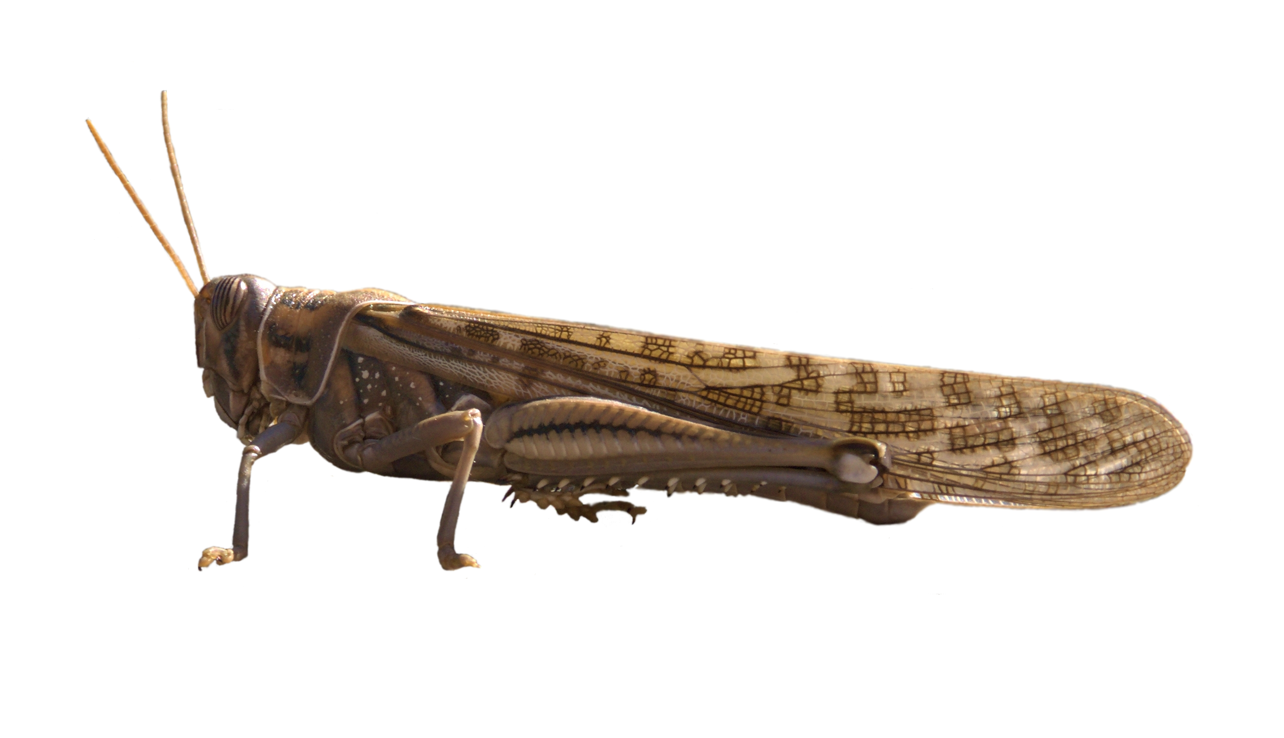 Wüstenheuschrecke, desert locust